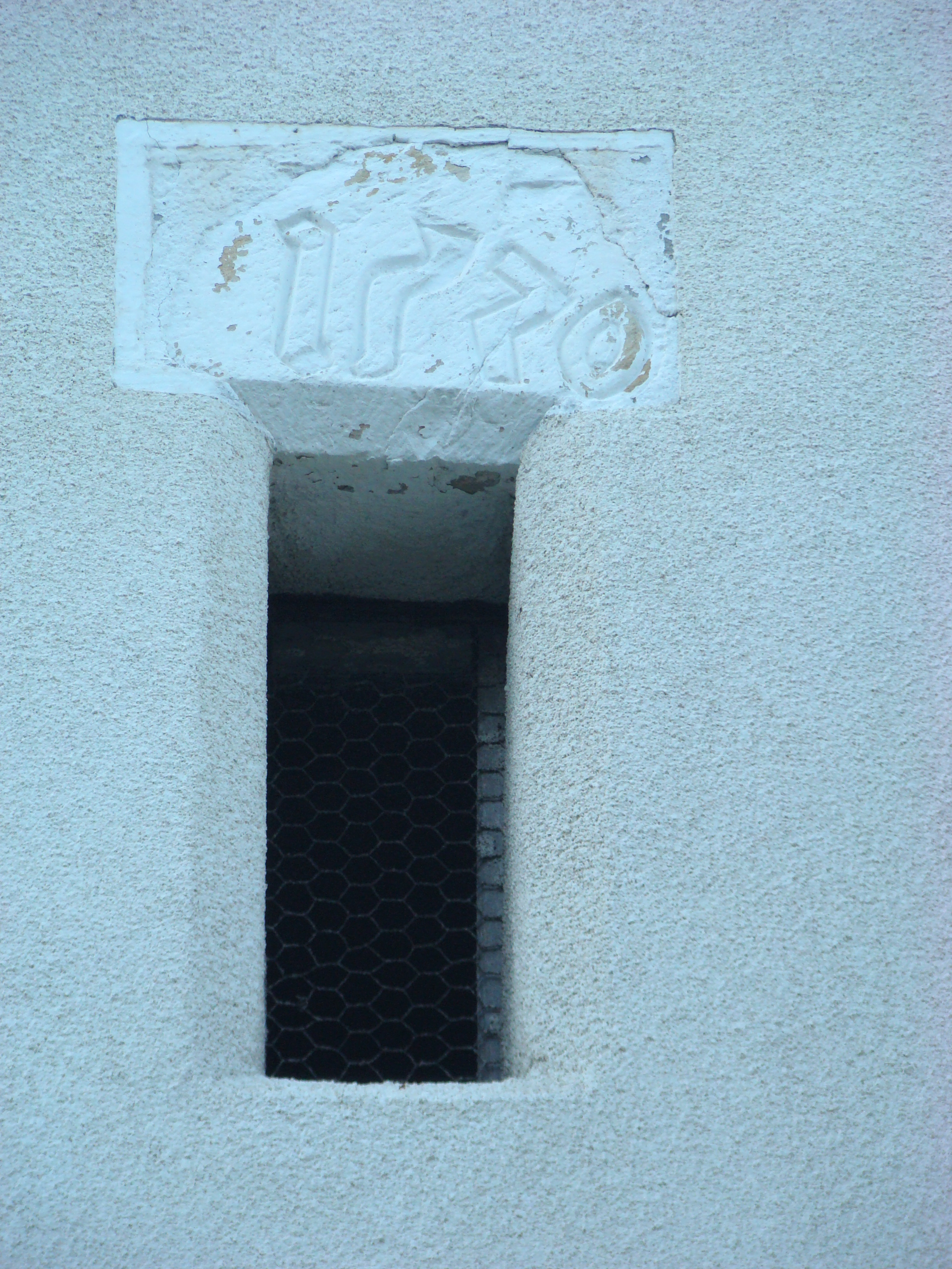 Biserica romano -catolică, sat Gheorghieni; comuna Feleacu, județul Cluj